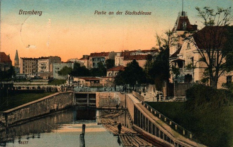 Śluza Miejska stara pocztówka